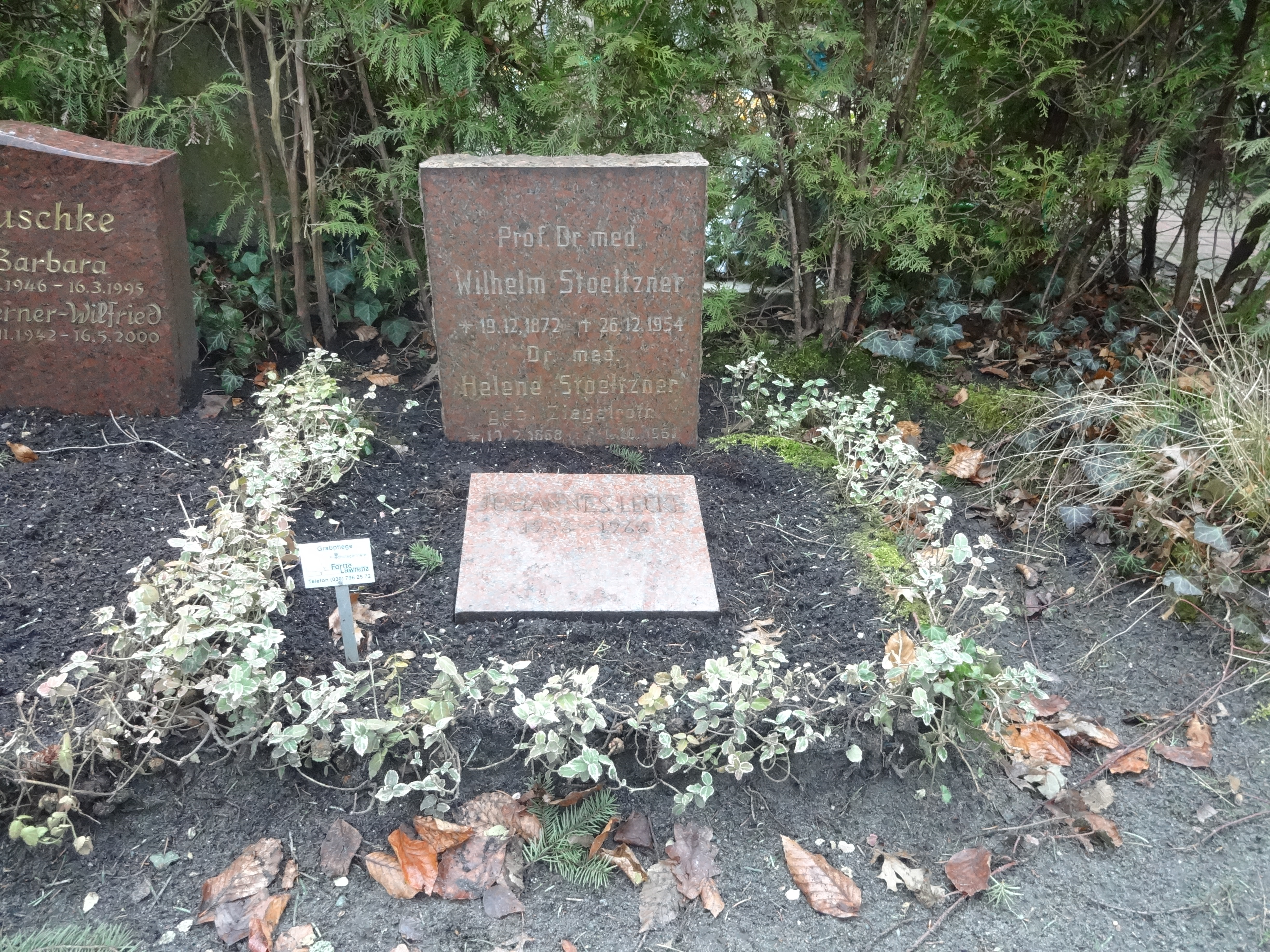 Wilhelm Stoeltzner, Friedhof Lichterfelde (Stoeltzner war Professor für Kinderheilkunde und Leiter der Universitätsklinik in Königsberg